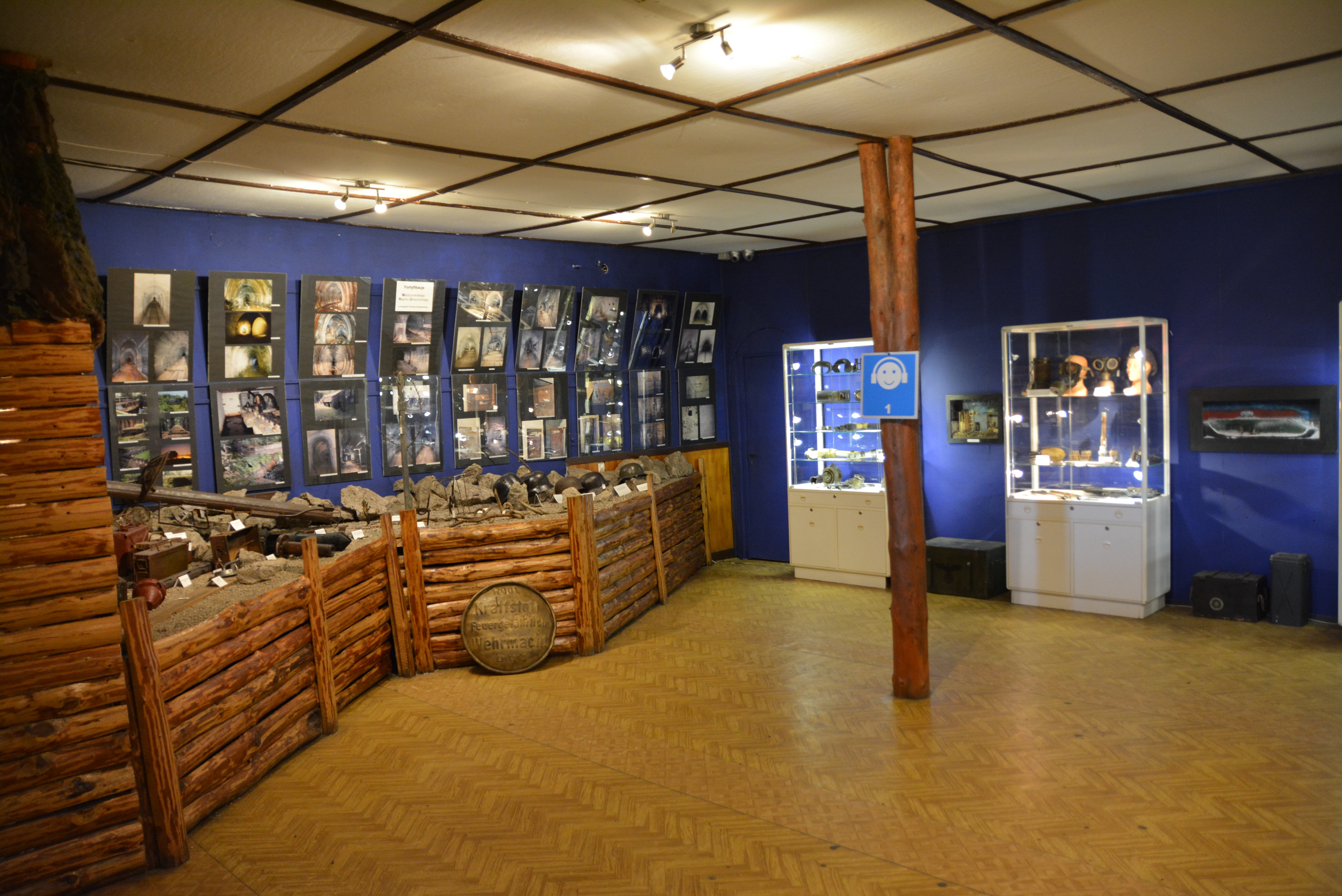 MRU - Muzeum Fortyfikacji i Nietoperzy w Pniewie